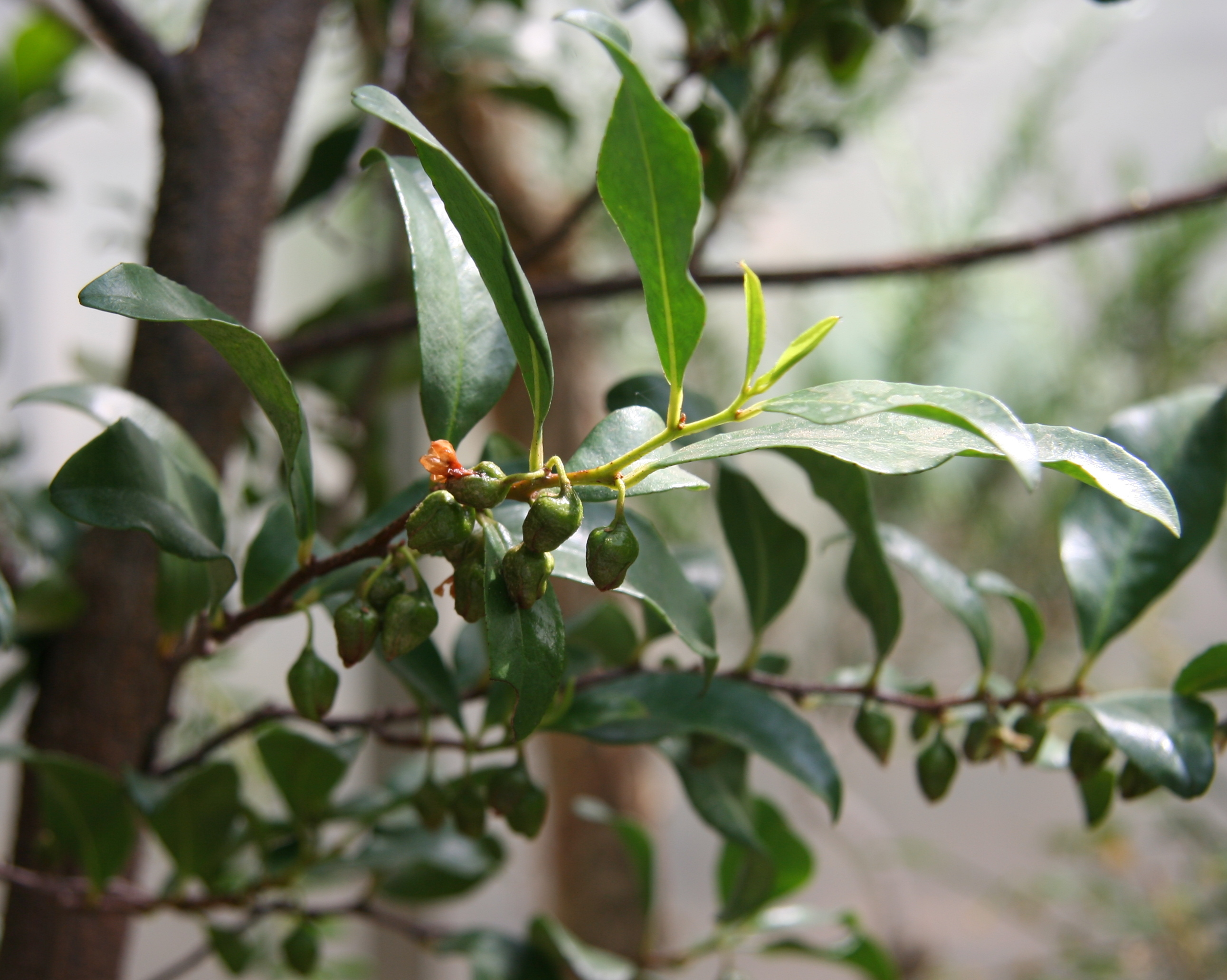 Visnea mocanera im Botanischen Garten Dresden